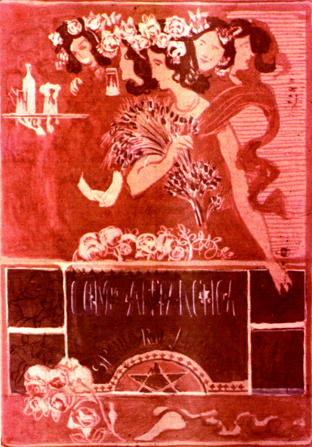 Obra do Projeto Eliseu Visconti